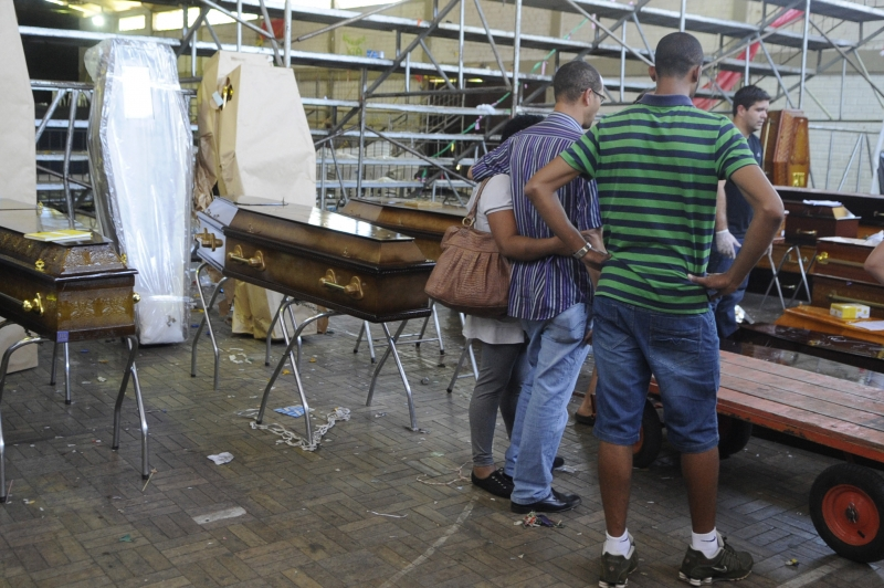 No centro desportivo, parentes identificam corpos de vítimas do incêndio na Boate Kiss.